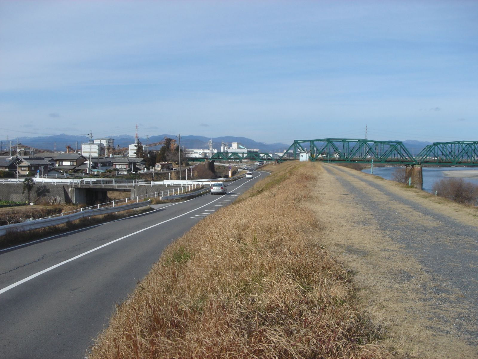 Gifu Prefectural Road 163(岐阜県道163号墨俣合渡岐阜線),Mizuho,Gifu,Japan(岐阜県瑞穂市)で北側を撮影。右側は長良川、右側は天王川。橋梁は東海道本線。